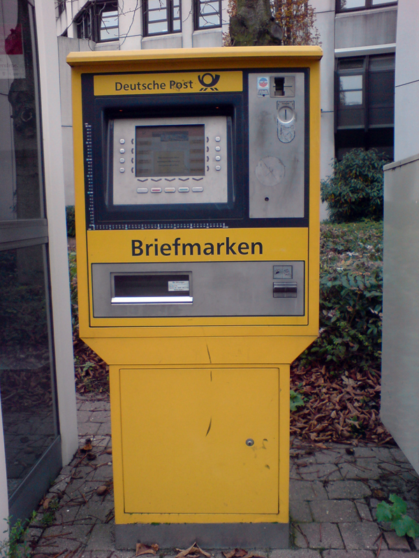 Briefmarkenautomat der Deutschen Post AG in Wiesbaden